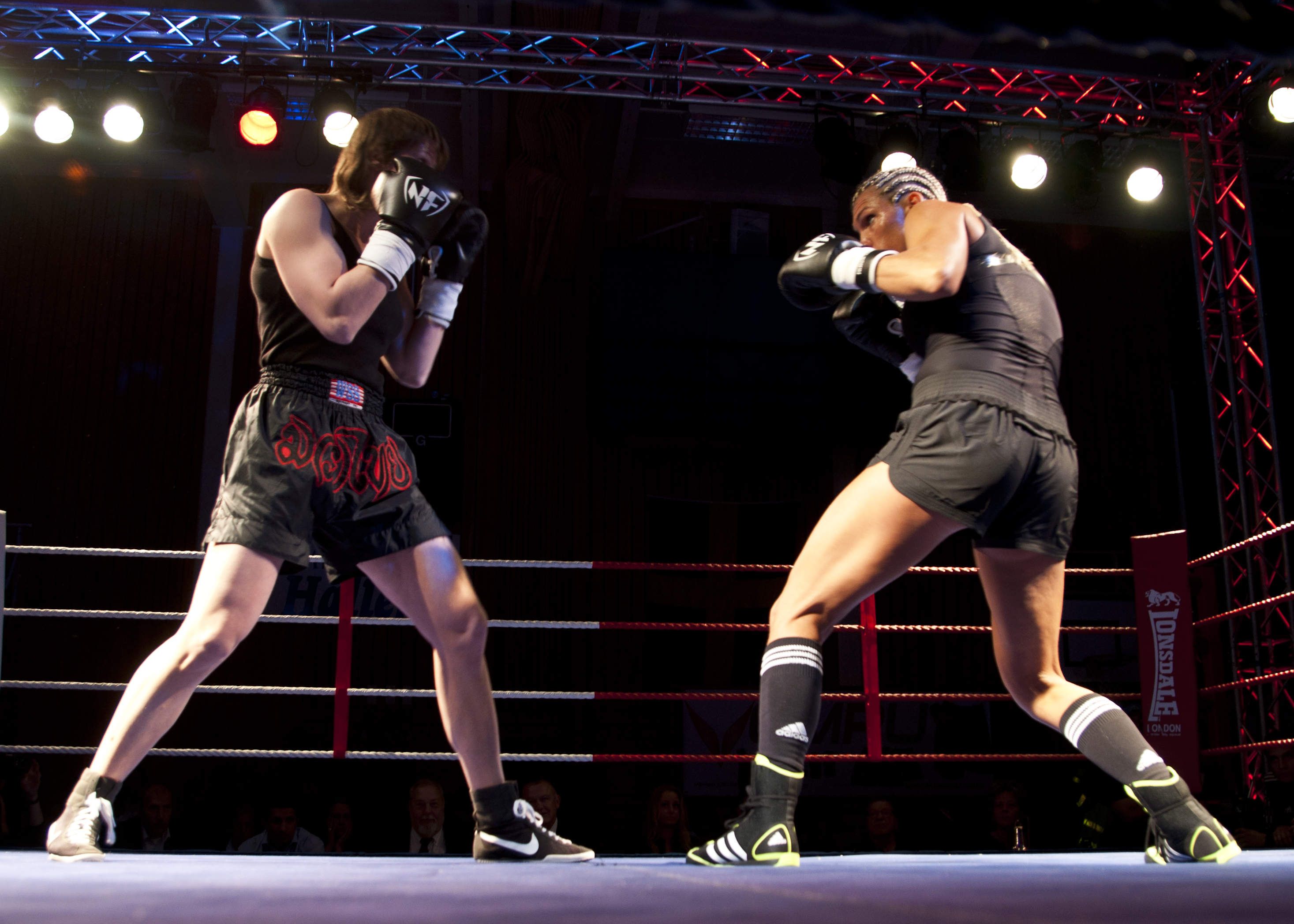 Mikaela Laurén (t.h.) och Victoria Demidova i match på en gala i Örebro 28 maj 2010. Laurén vann matchen med domarsiffrorna 60-54.